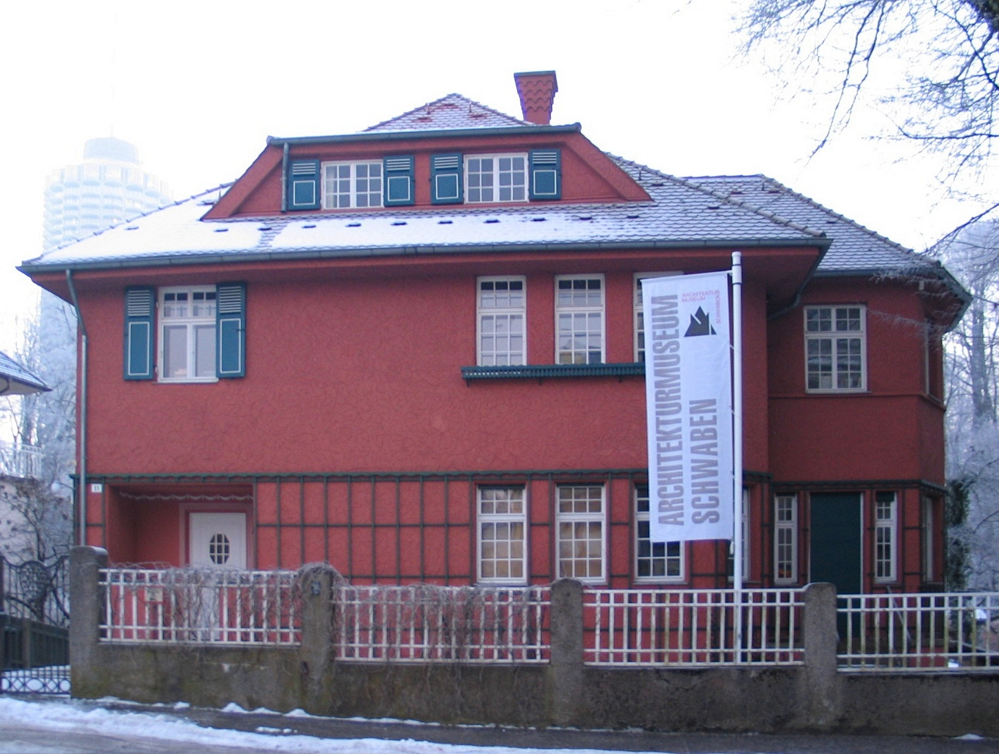 Augsburg, Thelottviertel, Architekturmuseum